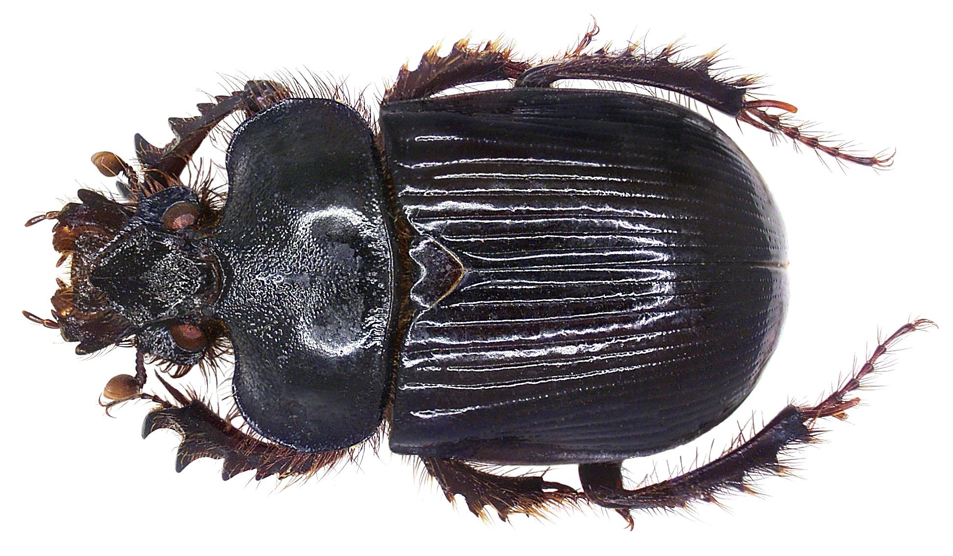 Familie: Scarabaeidae Grösse: 20-30 mm Verbreitung: Spanien, Portugal, Marokko Fundort: Spanien, Cadiz, 1976 Foto: U.Schmidt, 2007